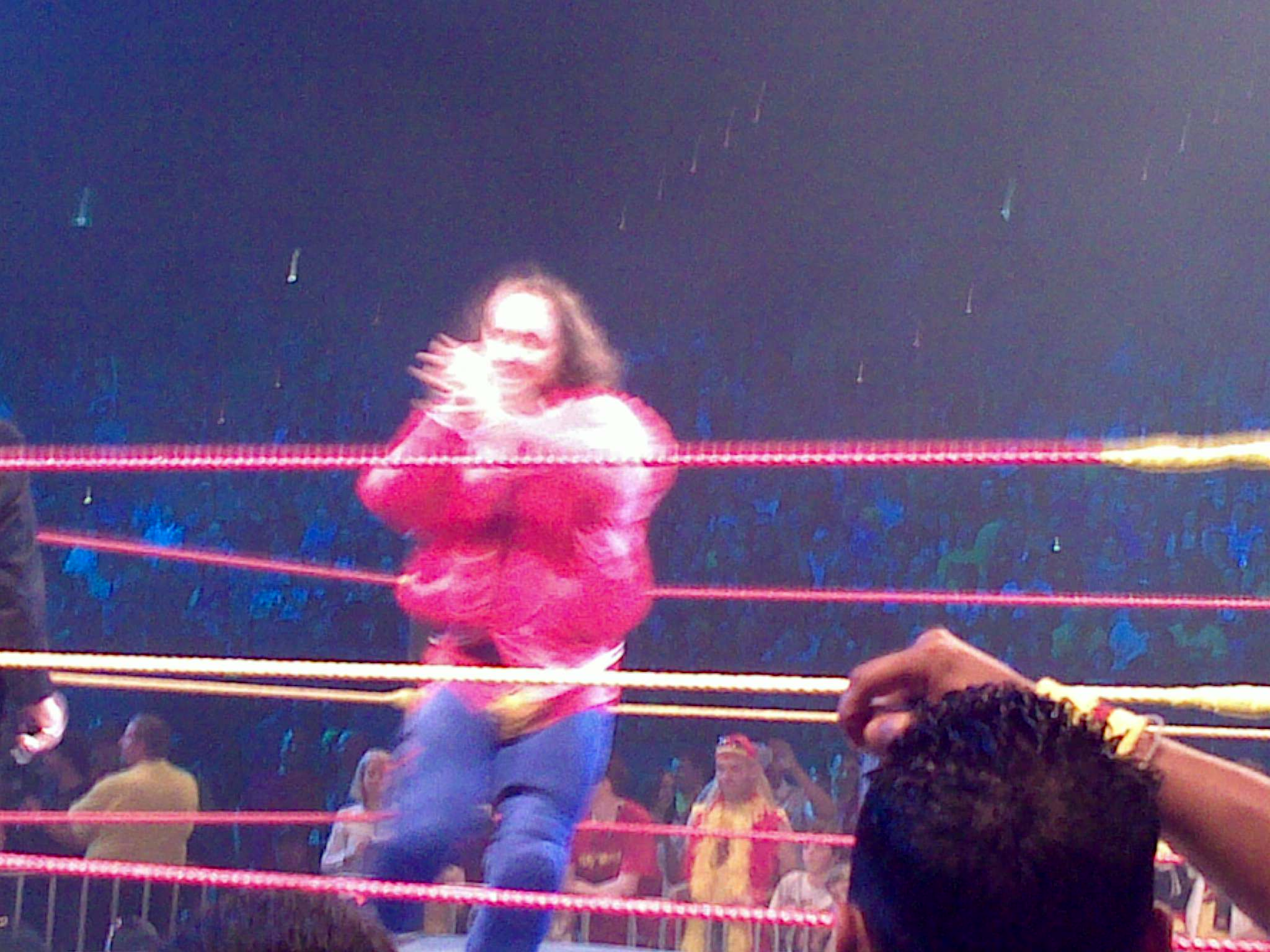 Poem readiing